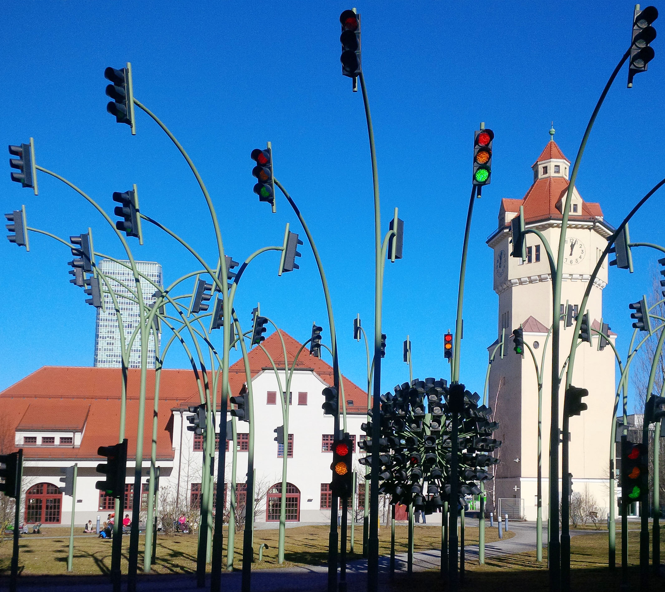 Johannes Brunner und Raimund Ritz, Traffic Light Flower – Lichtkomposition mit etwa 400 Signalgebern, 2001, - Bayern, München, Stadtwerkszentrale, Emmy-Noether-Straße 2